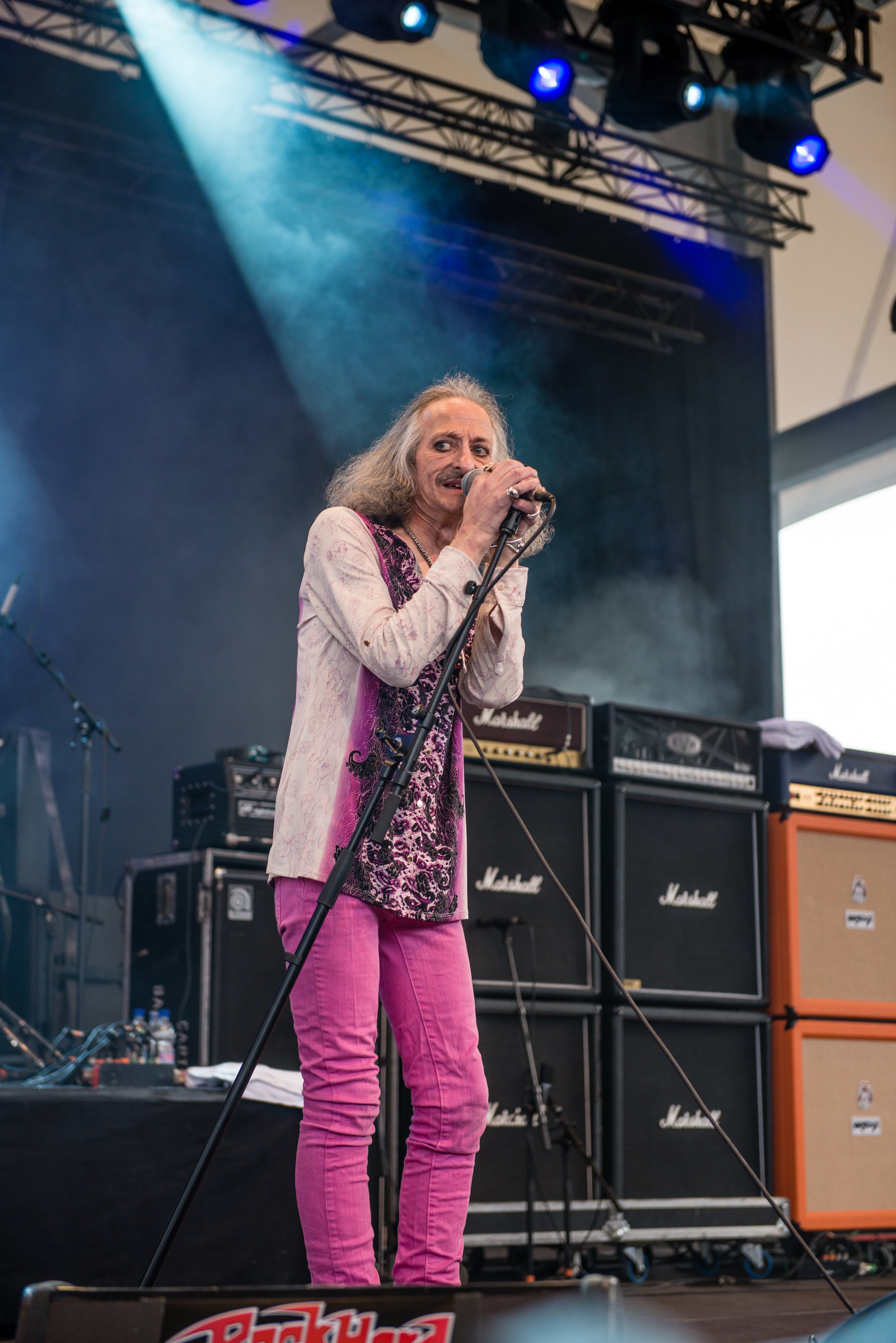 'Rock Hard Festival 2015; Gelsenkirchen Amphitheater': 'Pentagram'